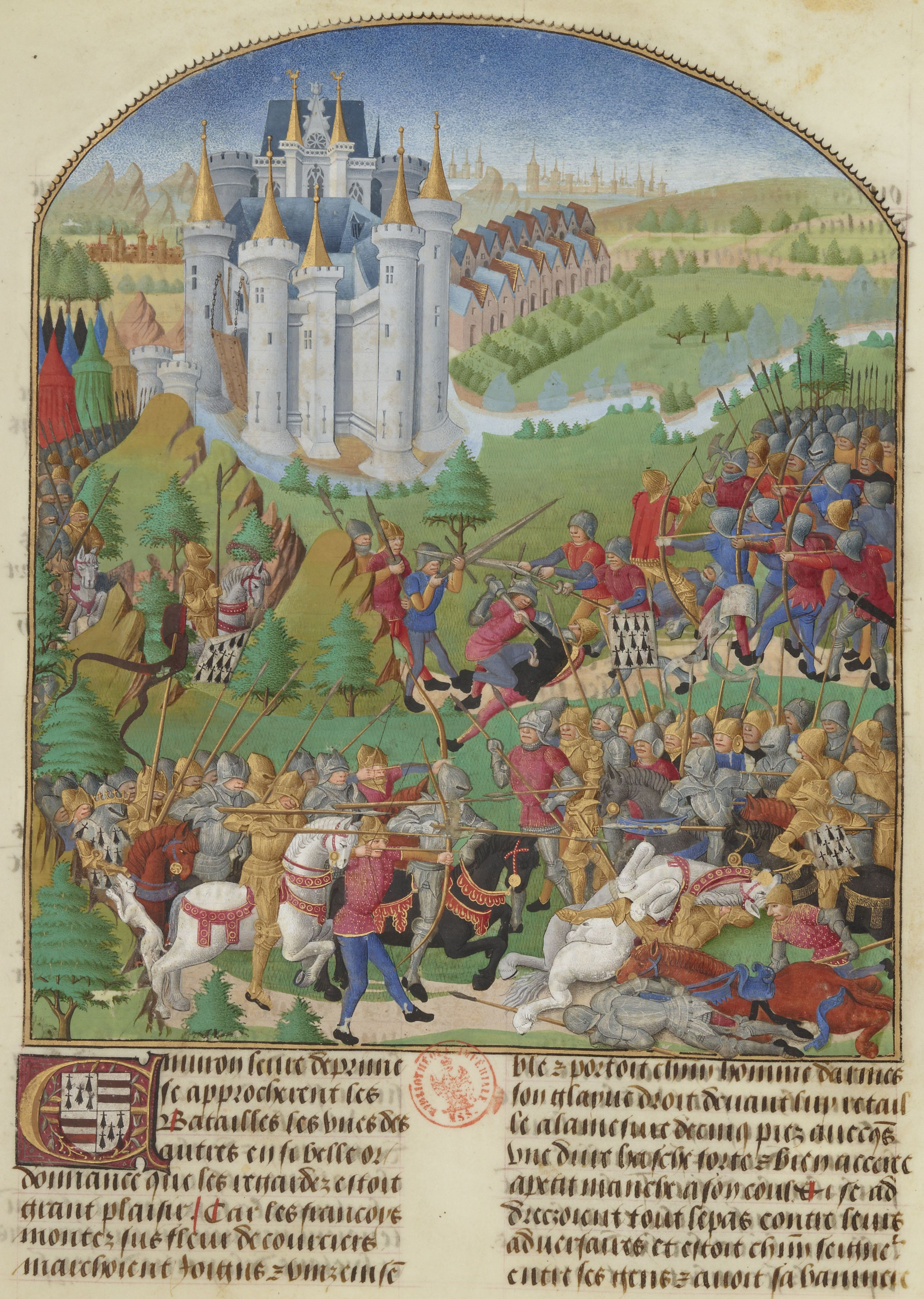 Enluminure incluse dans la Compillation des Cronicques et ystores des Bretons, partie en III livretz par Pierre Le Baud, secrétaire de Jean, sire de Derval.